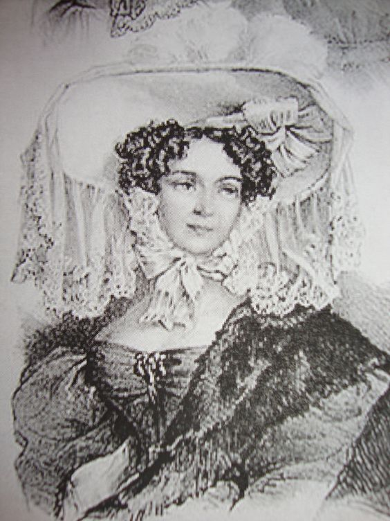 Мария Юзефина Потоцкая, урождённая Чарторыйская (1787—1862)